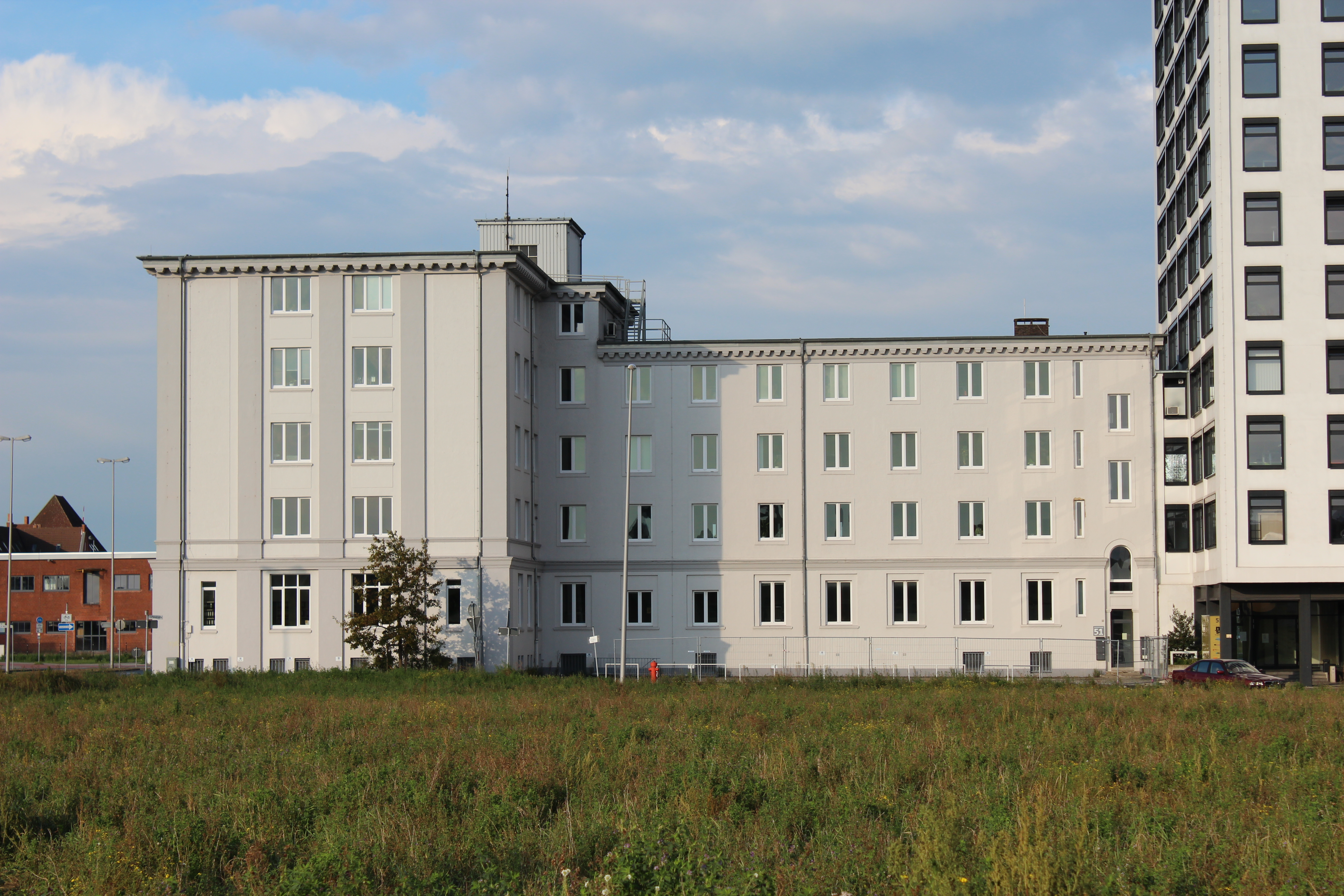 Dienstgebäude der Schutzpolizei, Kommando "Gruppe Hafen" in Bremen, Hafenstraße 51, 53 / Hafenkopf II.Das abgebildete Objekt ist ein geschütztes Kulturdenkmal in der Freien Hansestadt Bremen, mit der Nr. 1761 beim Landesamt für Denkmalpflege registriert.